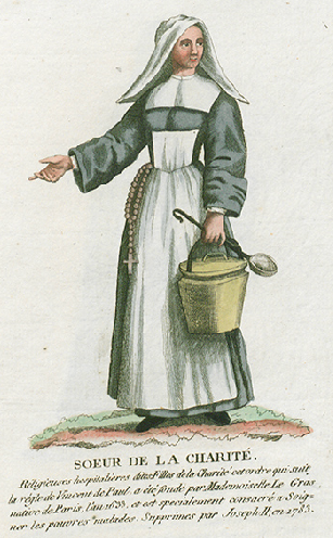 Collection de costumes de tous les ordres monastiques, supprimés à differentes époques, dans la ci-devant Belgique, Bruxelles, Philippe Joseph Maillart et sœur, 1811